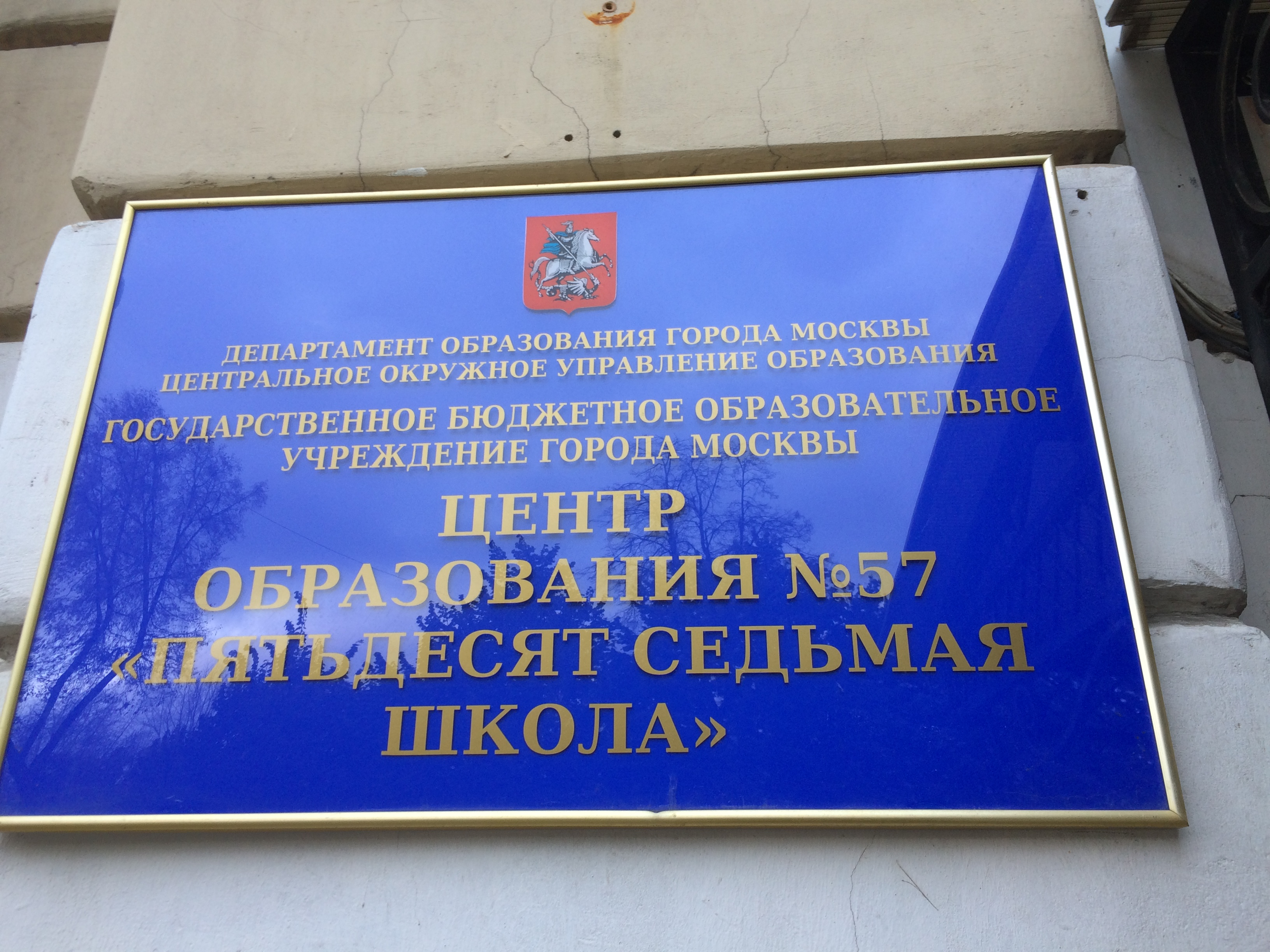 Государственное Бюджетное Образовательное Учреждение Центр Образования № 57 (ГБОУ ЦО № 57) «Пятьдесят седьмая школа»